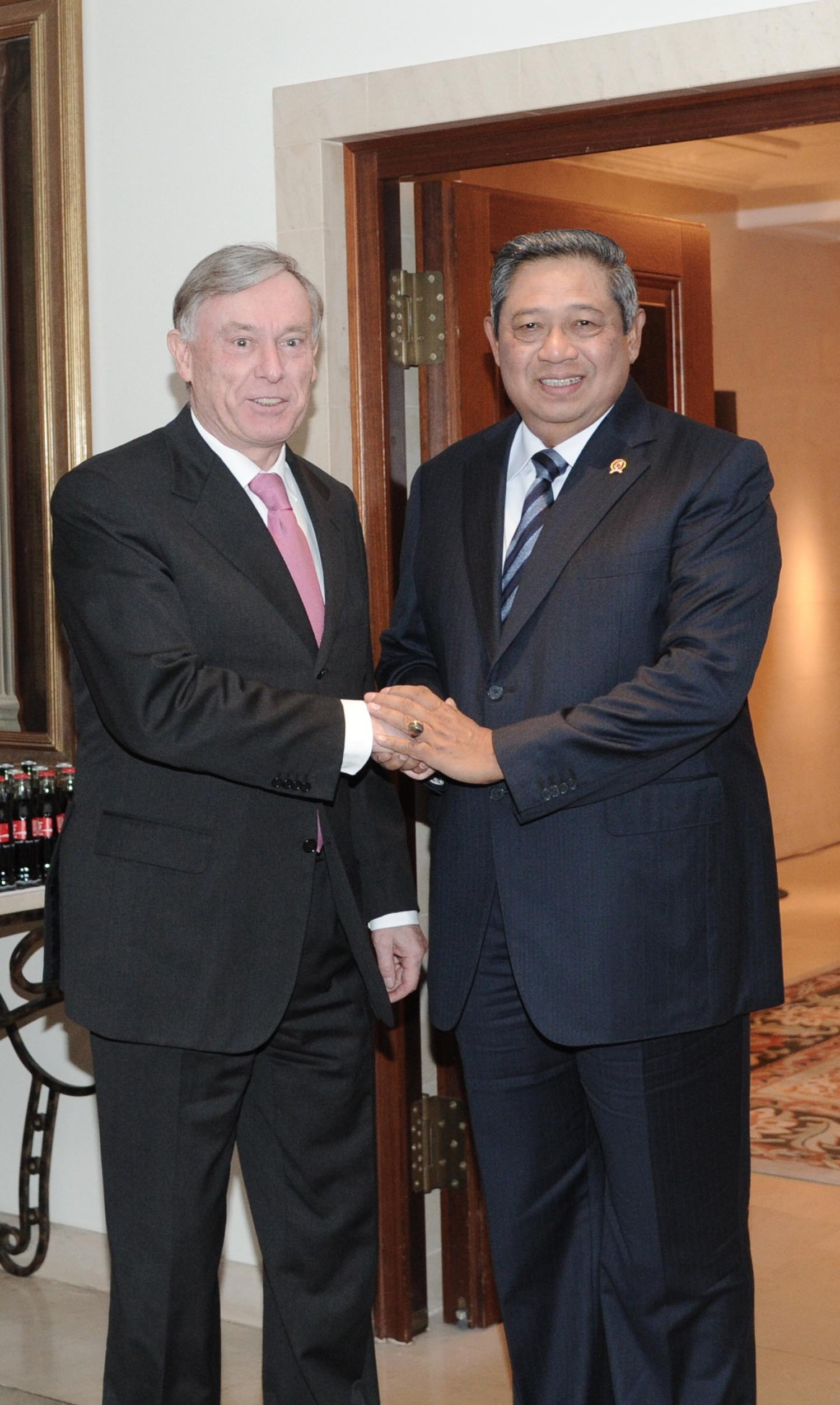 Presiden SBY menerima kunjungan kehormatan mantan presiden Jerman, Horst Kohler di Ruang Kammenzimmer, Hotel Adlon Kempinski, Berlin, Jerman, 5 Maret 2013